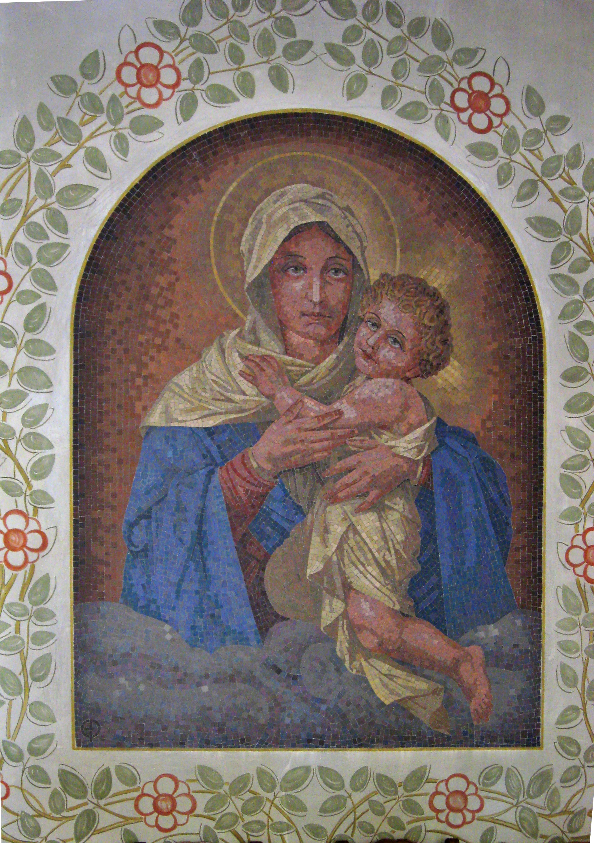 Blick auf den Altarhintergrund in der Kapelle in Körprich